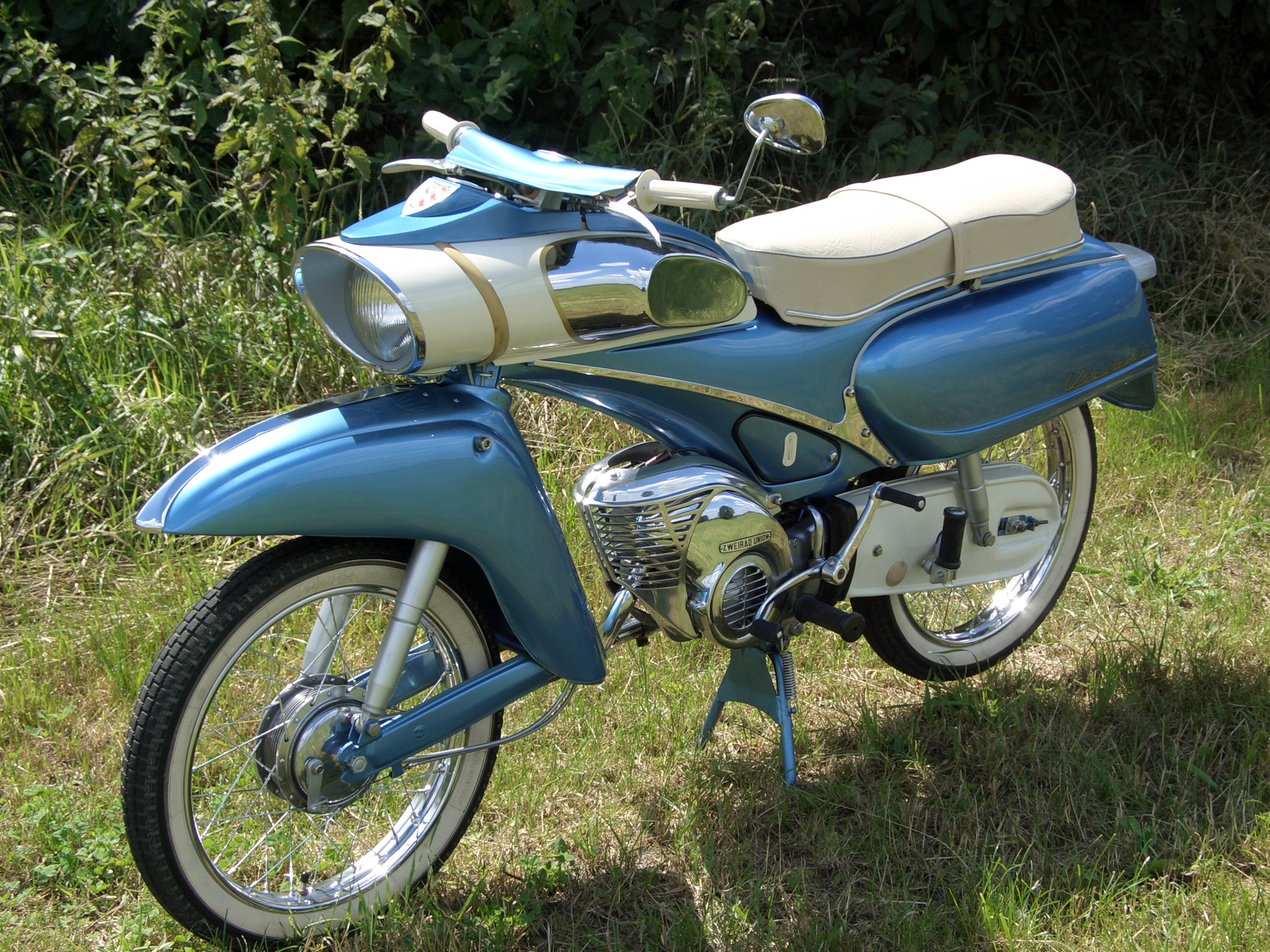 Blechbanane